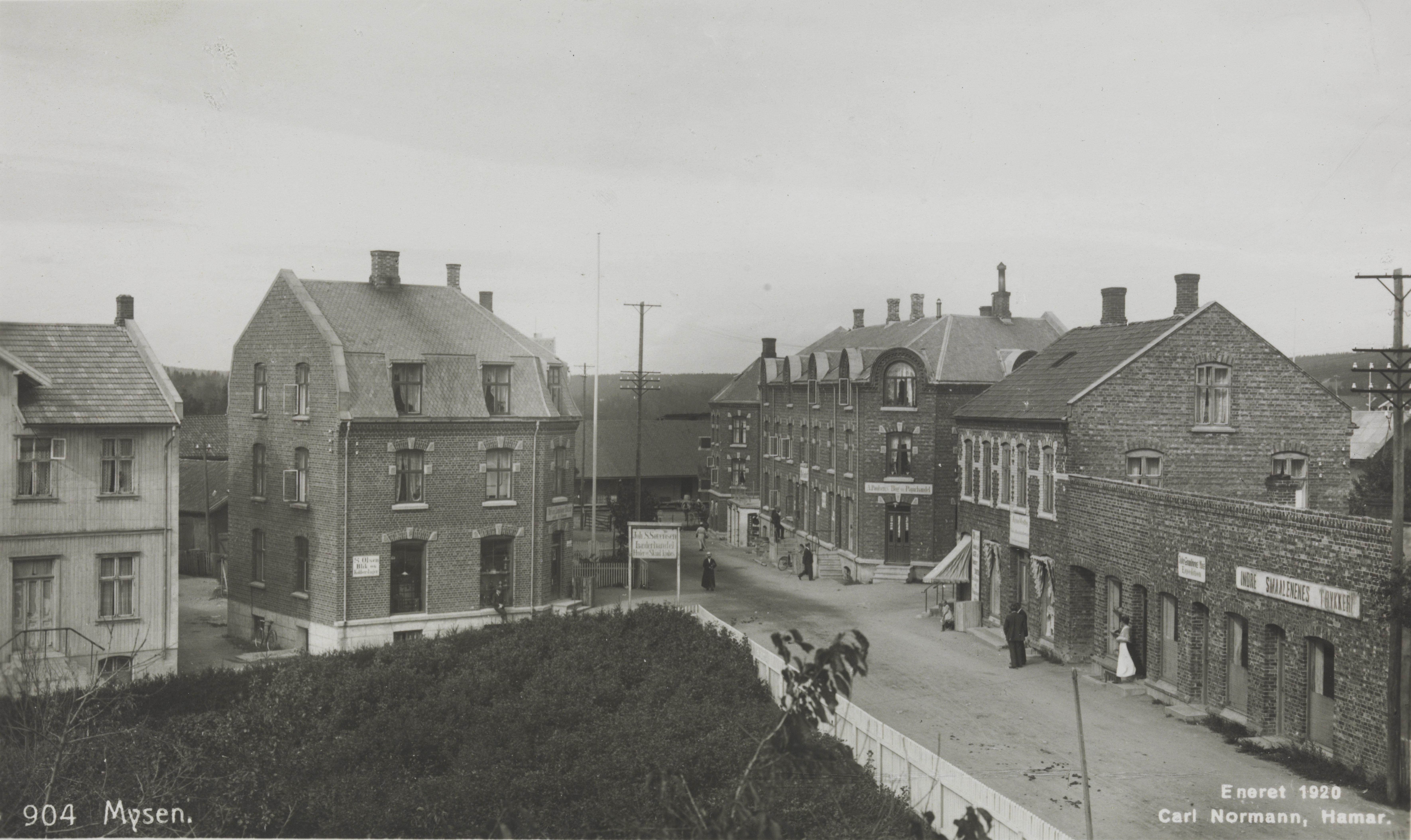 Mysen, Storgaten mot krysset med Jernbanegaten, Mysen stasjon i bakgrunnen